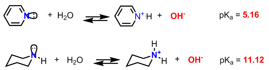 Basicità della piridina